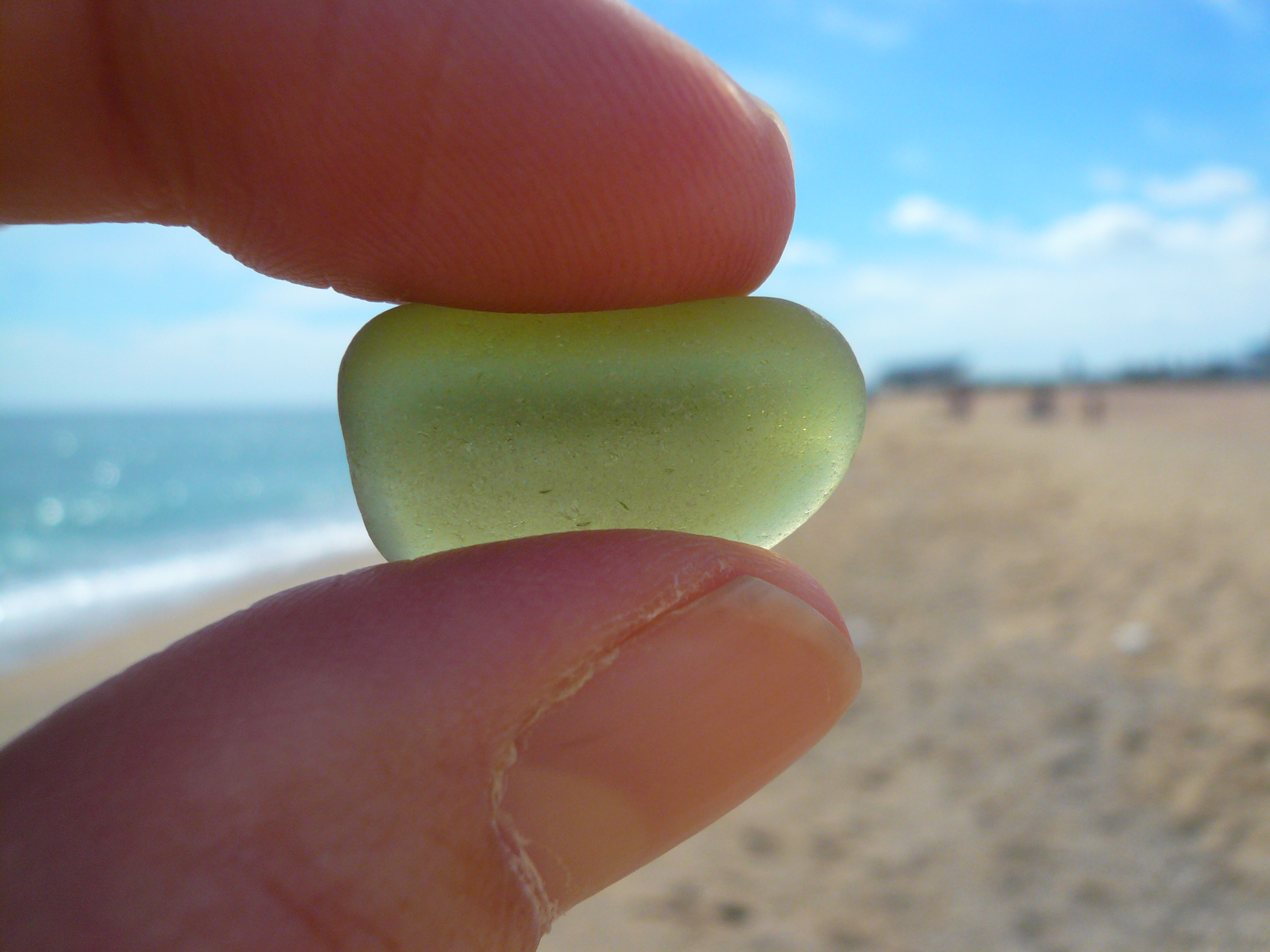 Platja del Parc del Litoral: platja del Litoral i platja del Camp de la Bota o del Fòrum (Sant Adrià de Besòs). Sorra mitjana, urbà. This is a a photo of a beach in Catalonia, Spain, with id: PL-CT-17003-252